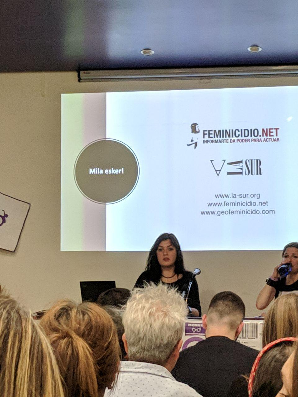 Amelia Tiganus salerosketatik bizirik atera dena, Gafas Moradas elkarteak antolaturiko hitzaldian. atariaren koordinatzailea da.